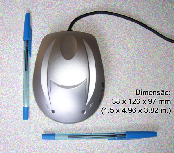 Speedtouch 330 USB ADSL Modem Dimensao